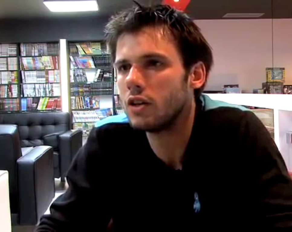 Orelsan en interview en 2011